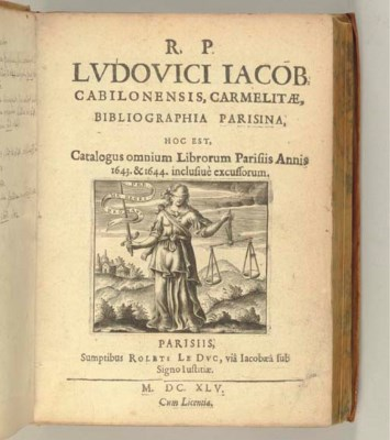 Bibliographia Parisina, hoc est catalogus omnium librorum Parisiis annis 1643. & 1644. inclusive excusorum. Paris: Rolet Le Duc, 1645.